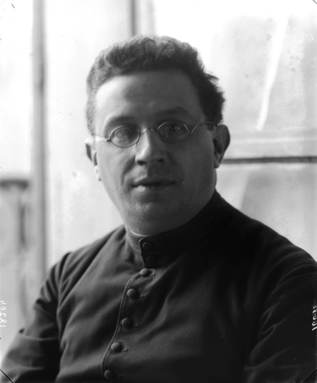 Compositore Giocondo Fino